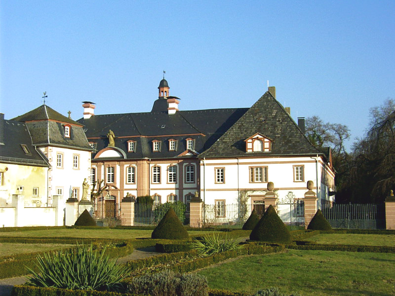 Blick aus dem Französischen Garten auf den heute noch bestehenden Teil der barocken Gebäude. Links Gästehaus oder Hospital (heute Sitz der Außenstelle des Landeshauptarchivs Koblenz), rechts Konventsgebäude. Im Hintergrund Turmhaube der Kirche.